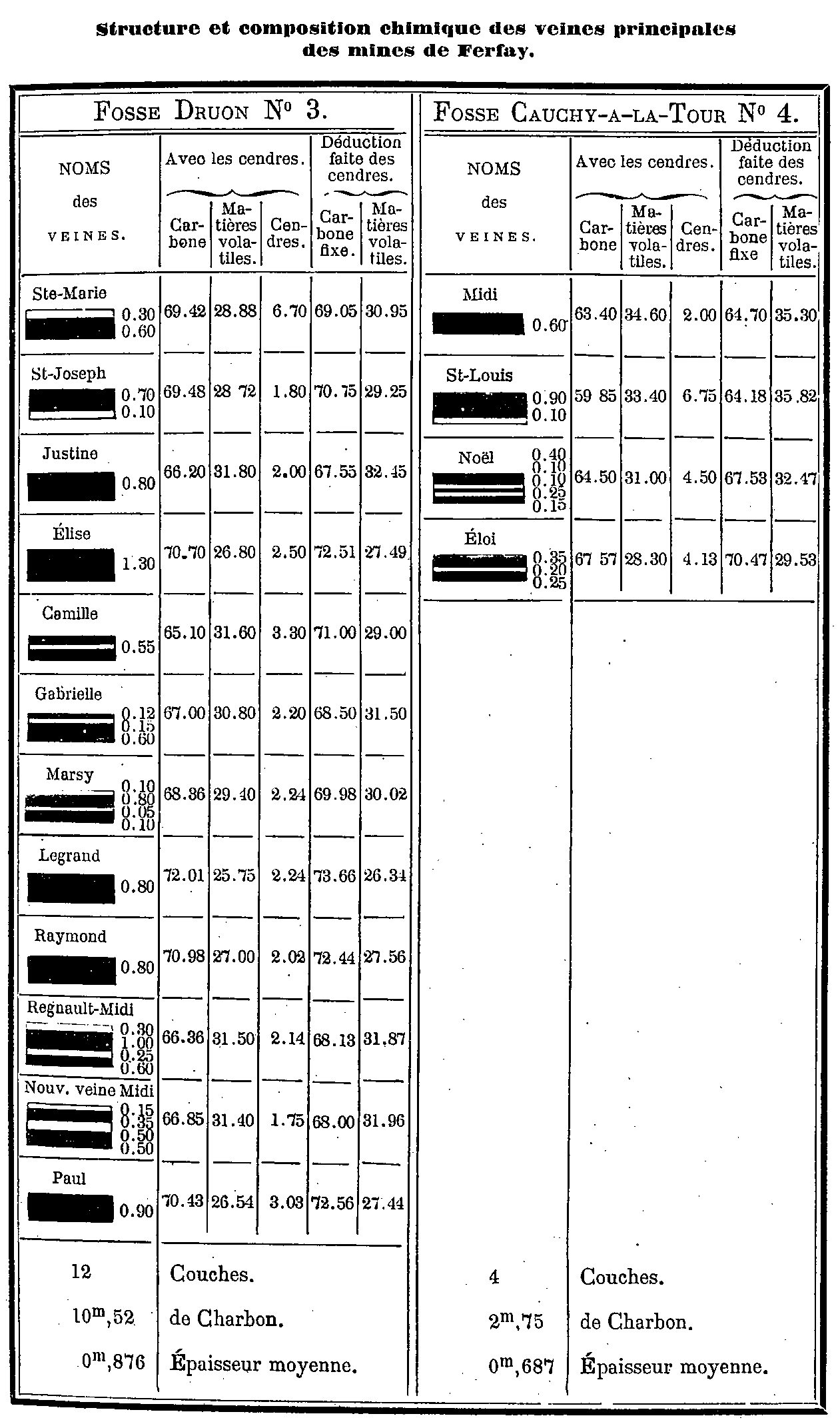 Veines recoupées aux fosses n° 3 et 4 de la Compagnie des mines de Ferfay.